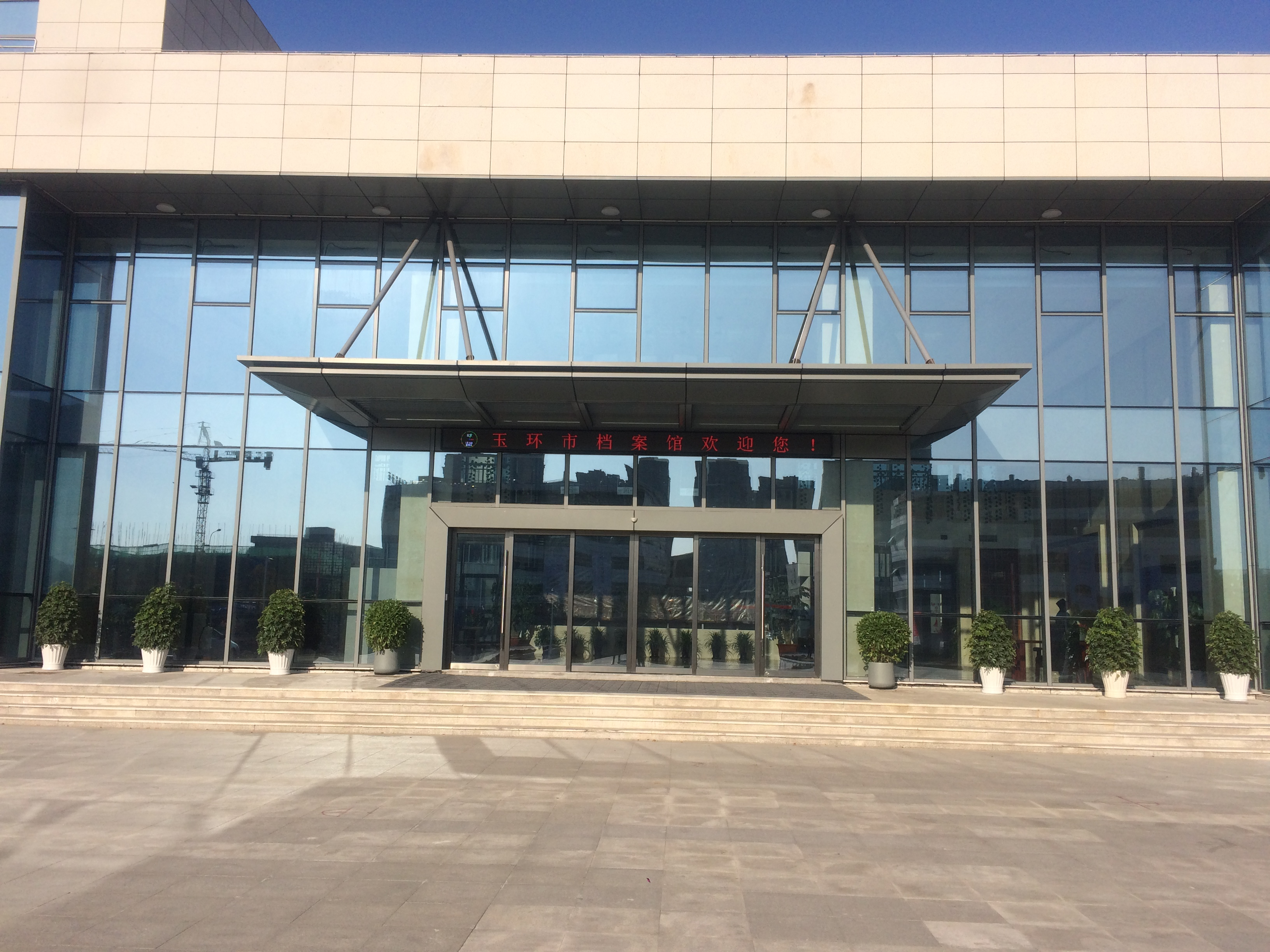 中文（中国大陆）: 玉环市档案馆